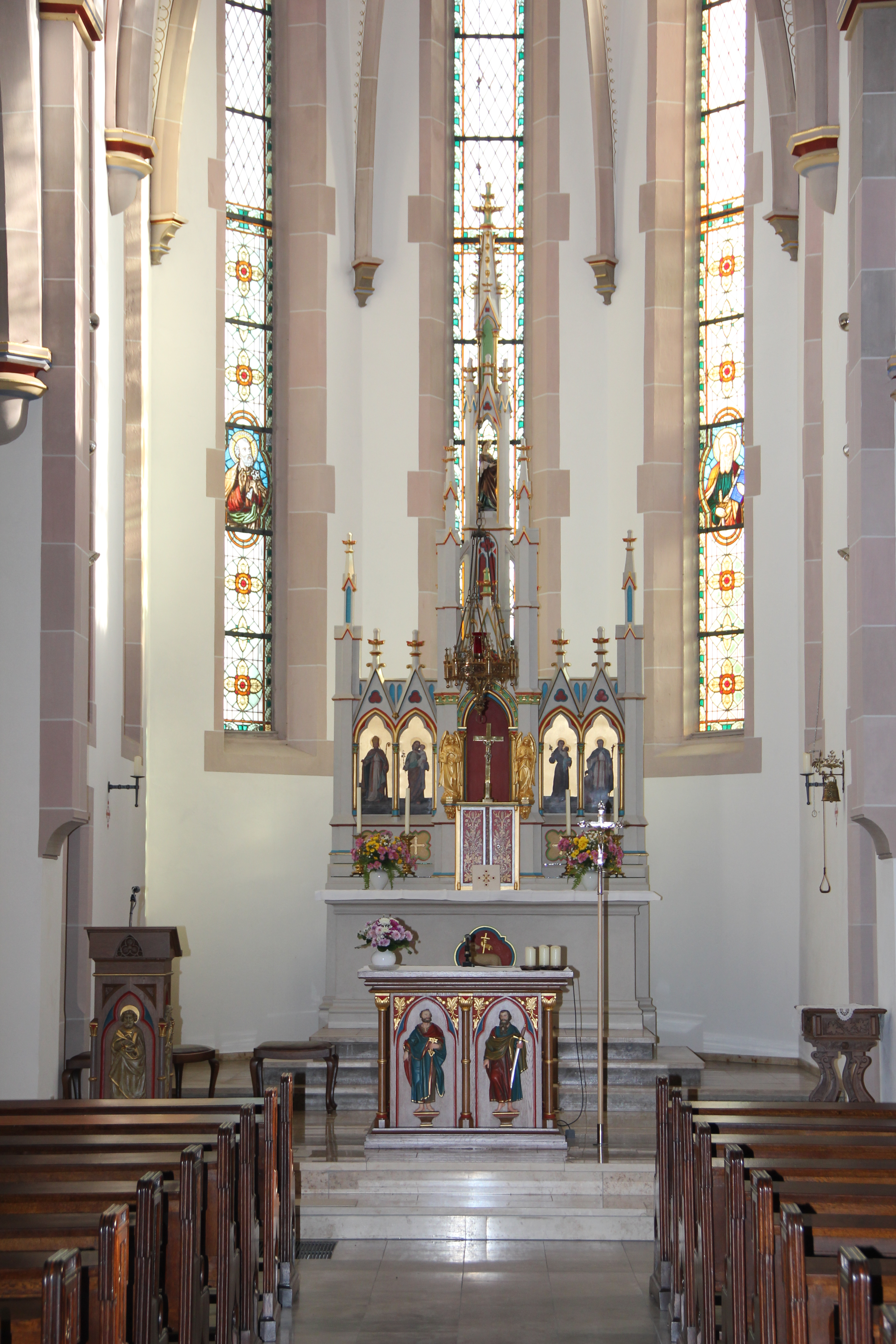 Innenansicht der Sankt-Katharina-Kirche in Dössel